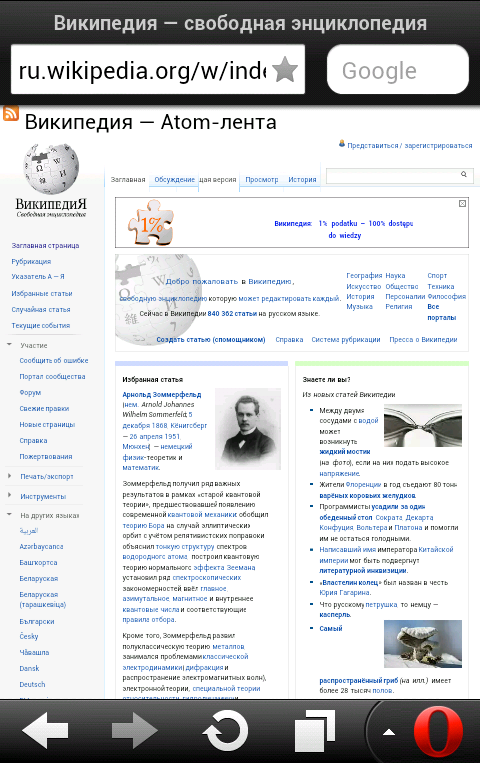 Opera Mini 7, запущенная на Android